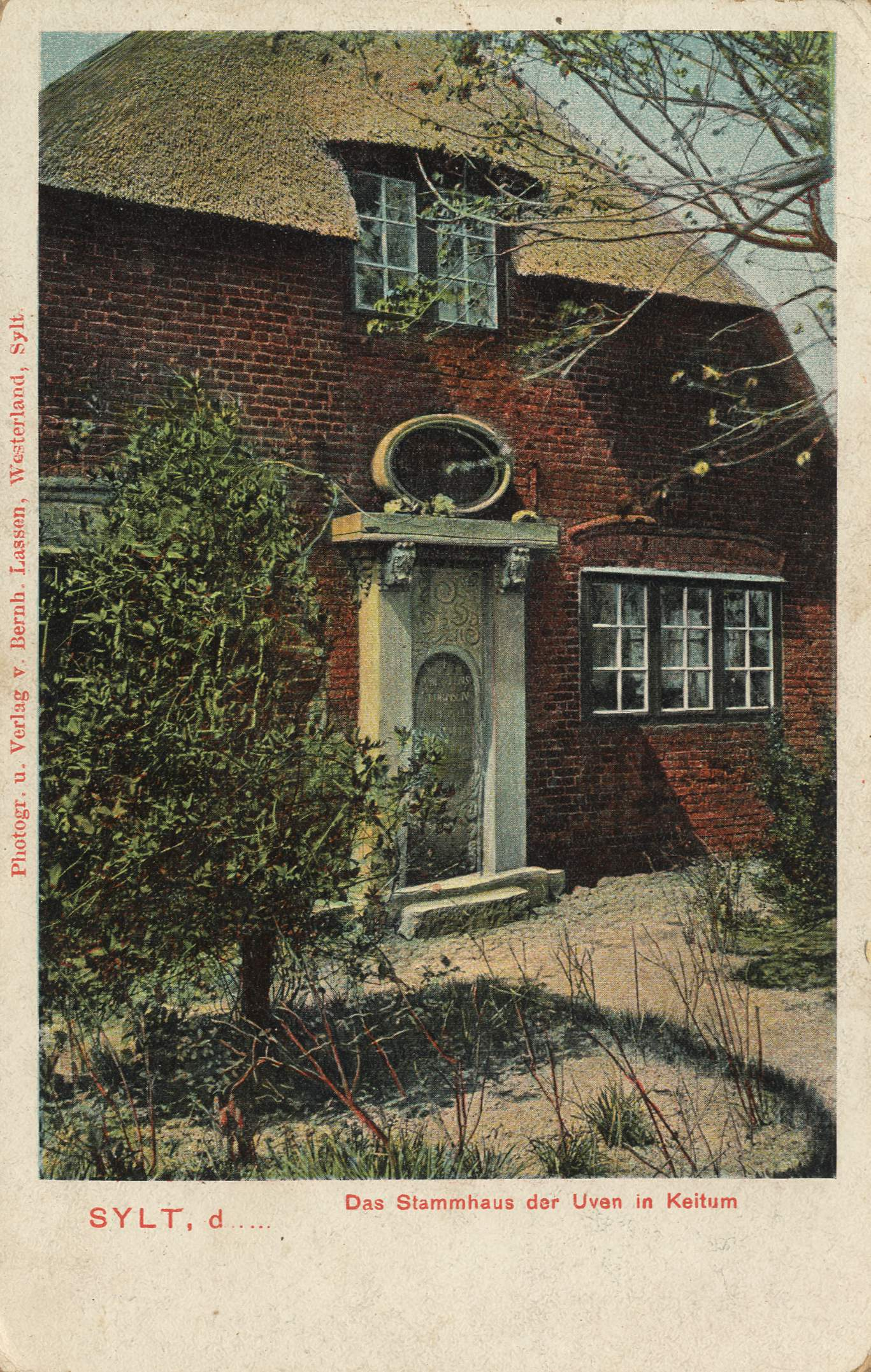 Das Stammhaus der Uven in Keitum